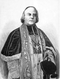 Jacques Dehaene (1809-1882)